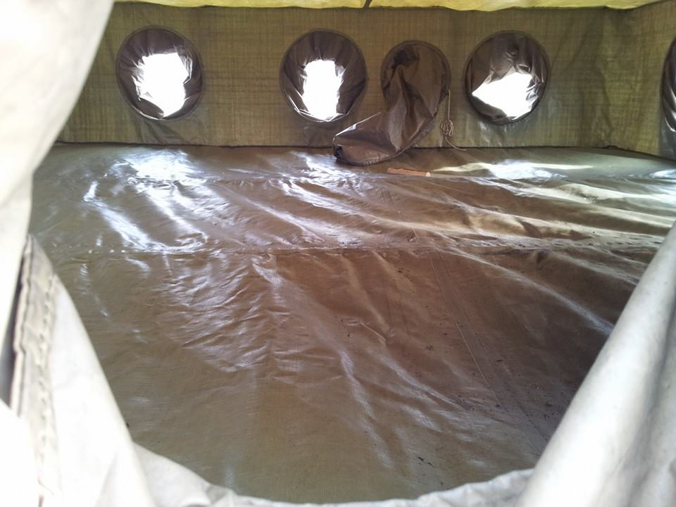 Widok wewnątrz komory grupowej KG-12 (rękaw)